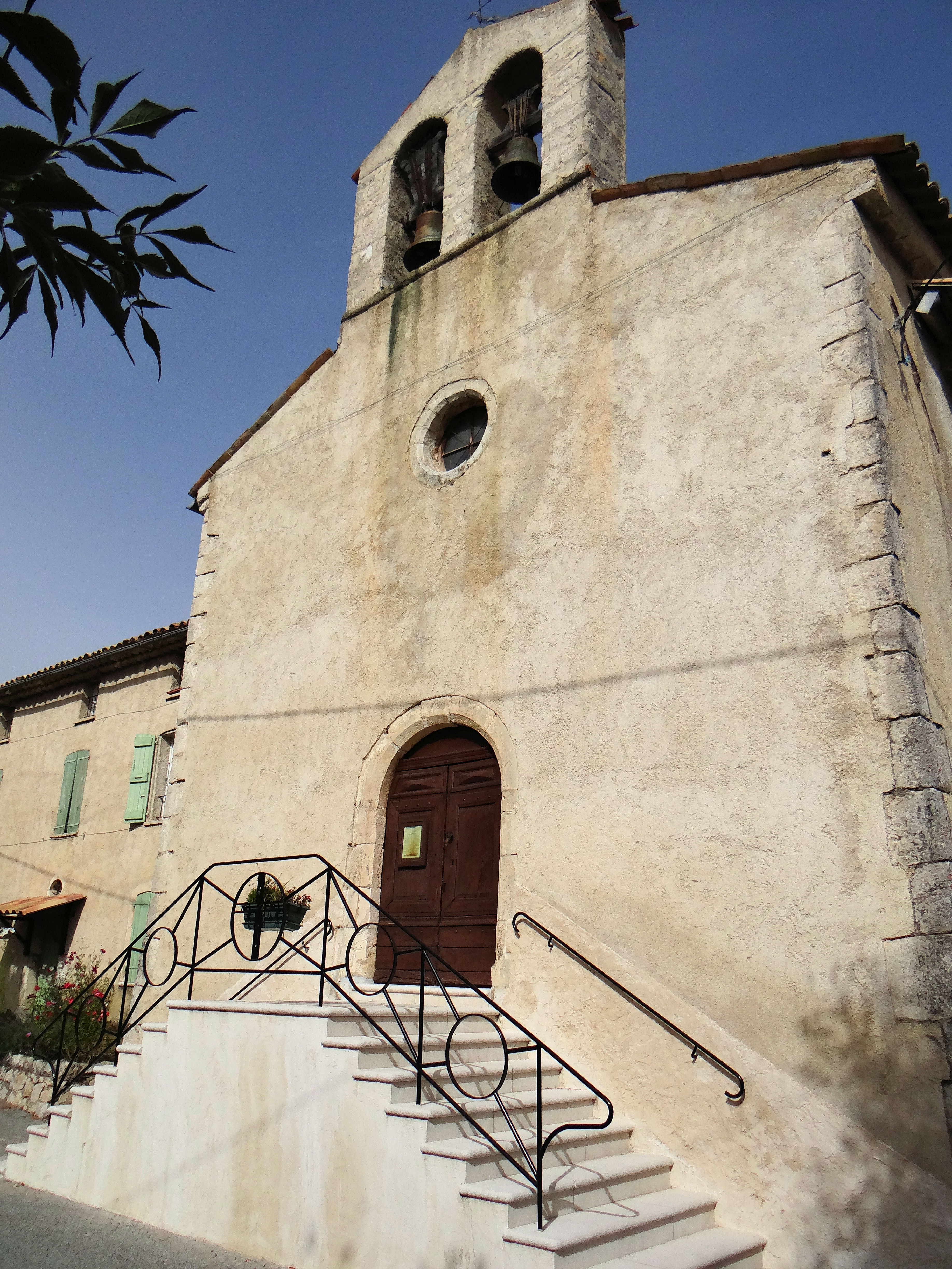 Valderoure - L'église